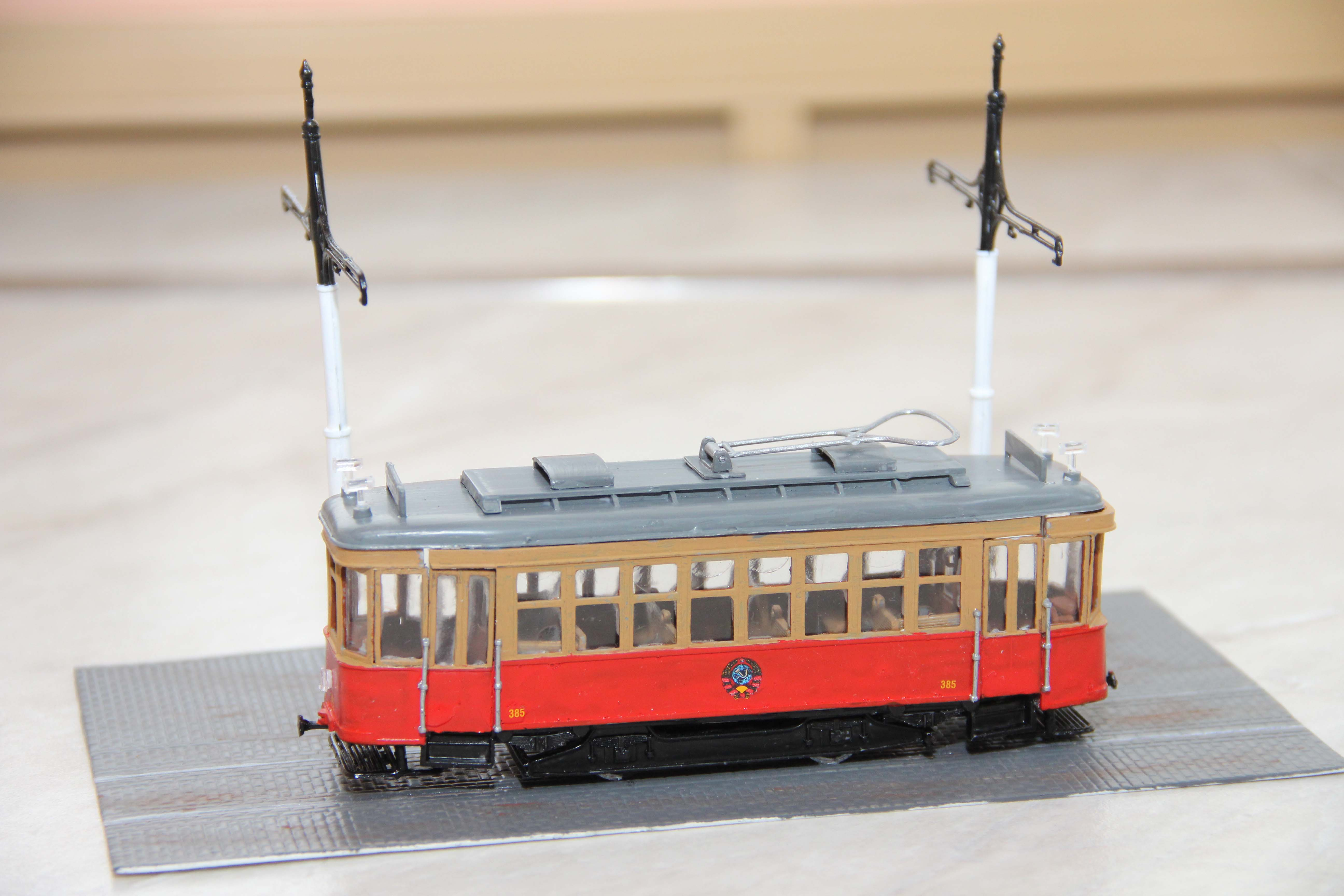 (изг. Сорокин Р.В., г. Астрахань, 2015 г.)